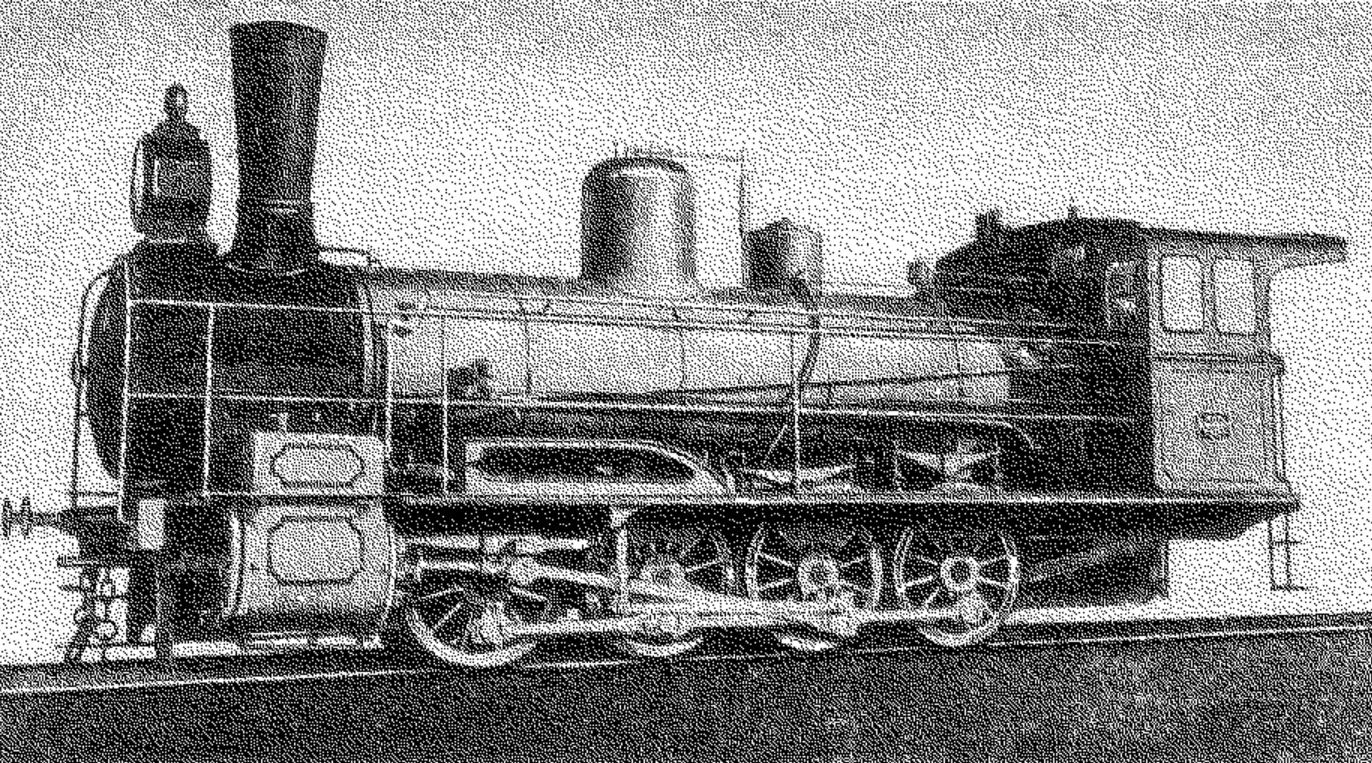 Паровоз типа 39 Коломенского завода. Один из первых паровозов серии О